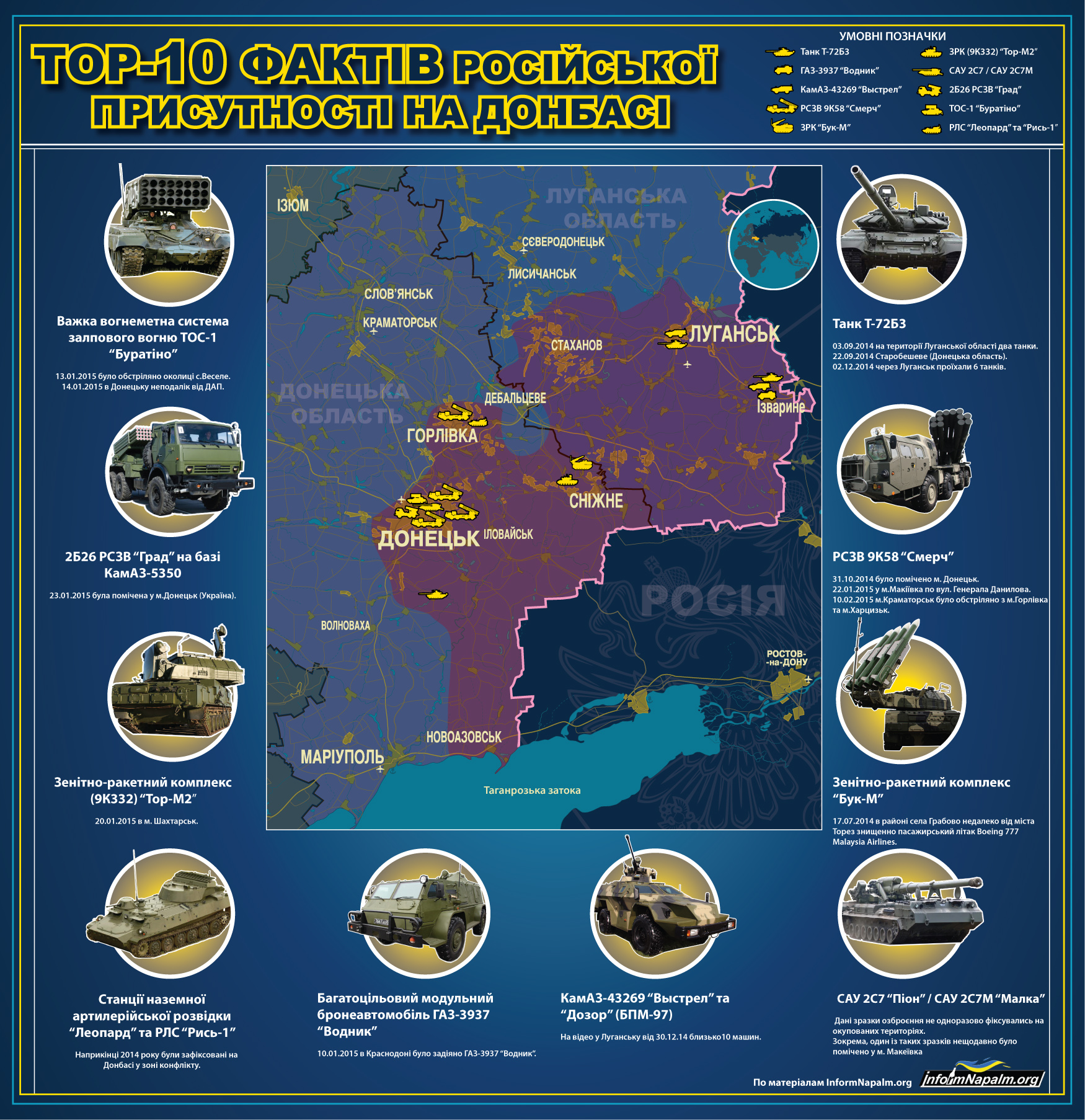 Інфографіка від Inform Napalm. Top-10 фактів російської присутності на Донбасі